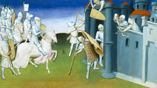 Осада Иерусалима в 1099 году. Миниатюра, XV век